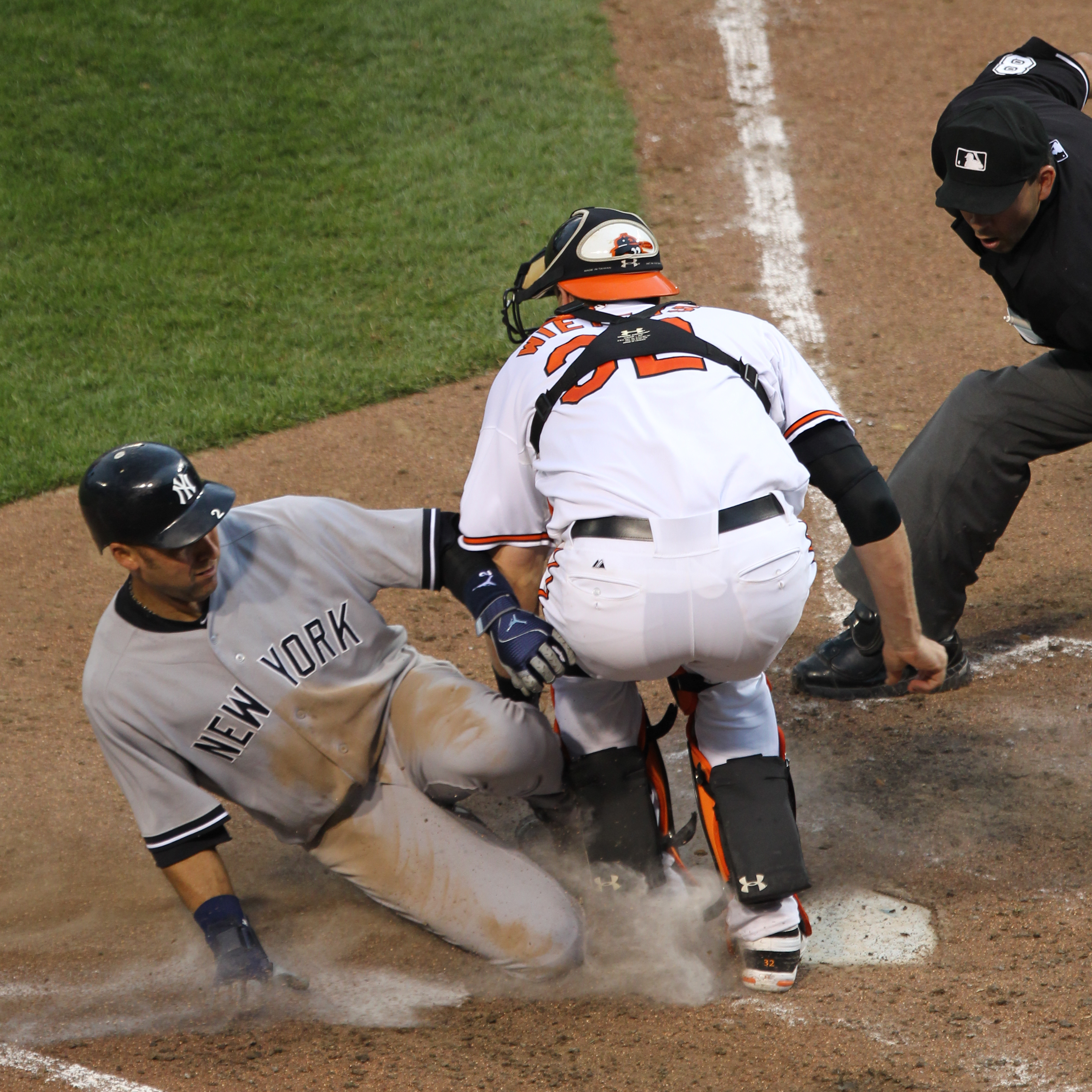 Matt Wieters blocks home plate from Derek Jeter.